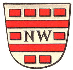 Wappen von Nieder-Wiesen